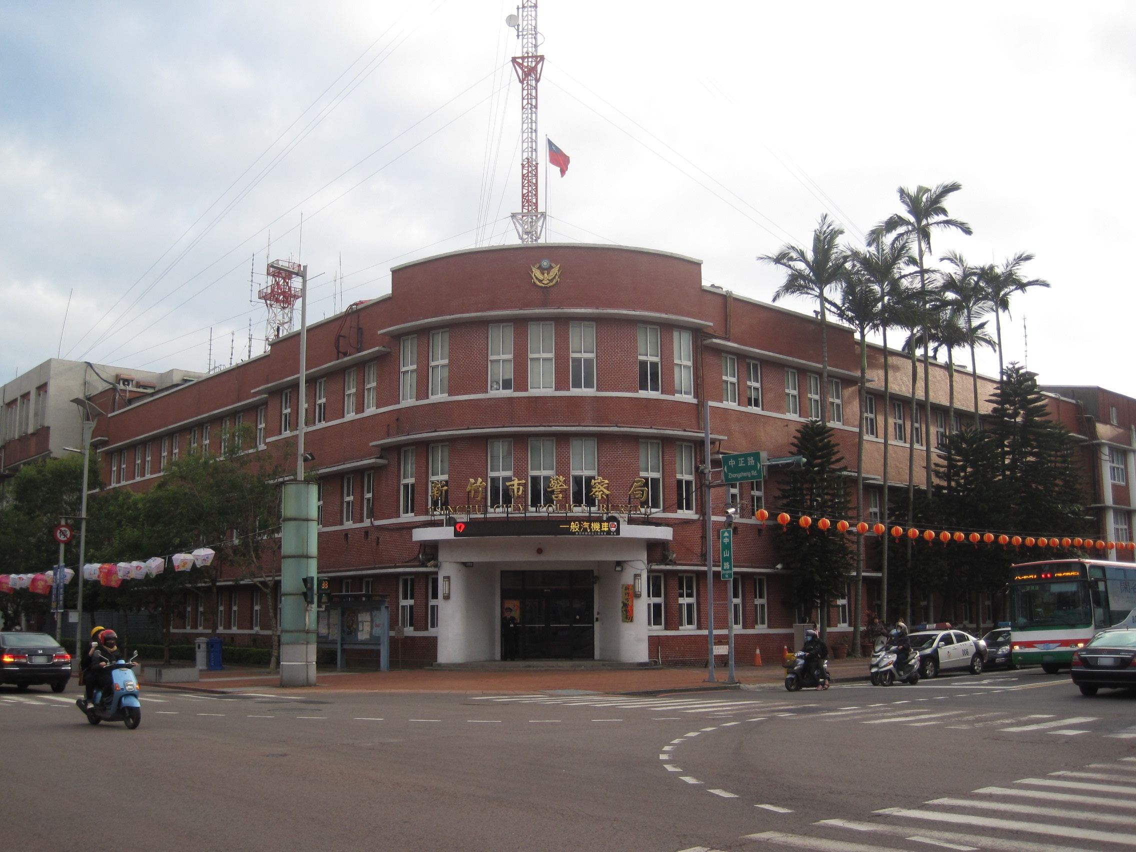 中文（台灣）: 新竹市警察局。